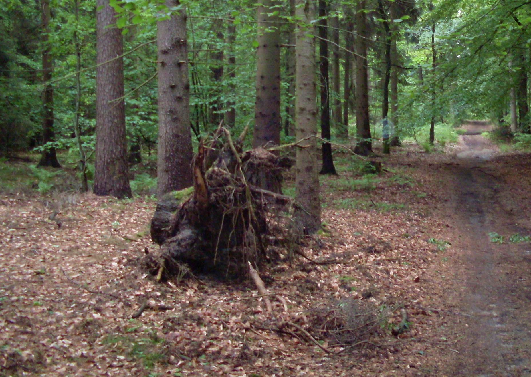 Puszcza Wkrzańska